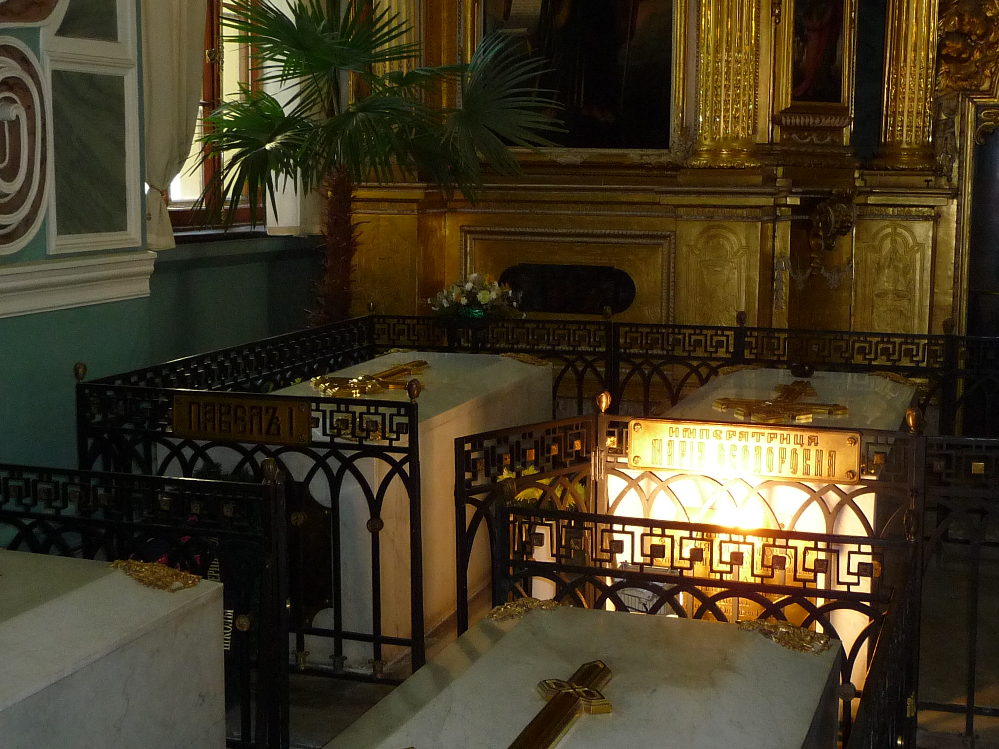 RussianTzarsTumbs-p1030590.jpg